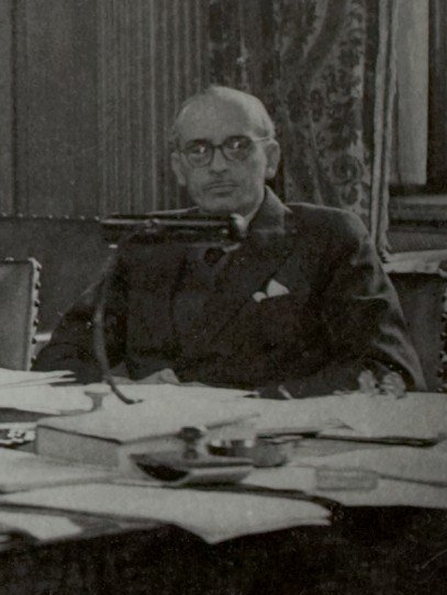 Hudson (USA), Jhr Eysinga (Holland) Sir Hurst Cecil (Engeland), Erich (Finland), Guerrero (San Salvador, president), Negulesco (Roemenie, ), Cheng (China), de Visser ( Belgie), Olivan (Spanje) leden van het Internationaal Hof voor Justitie. Staande de drie secretarissen. Laatste zitting in Nederland in october 1945 voor de opheffing